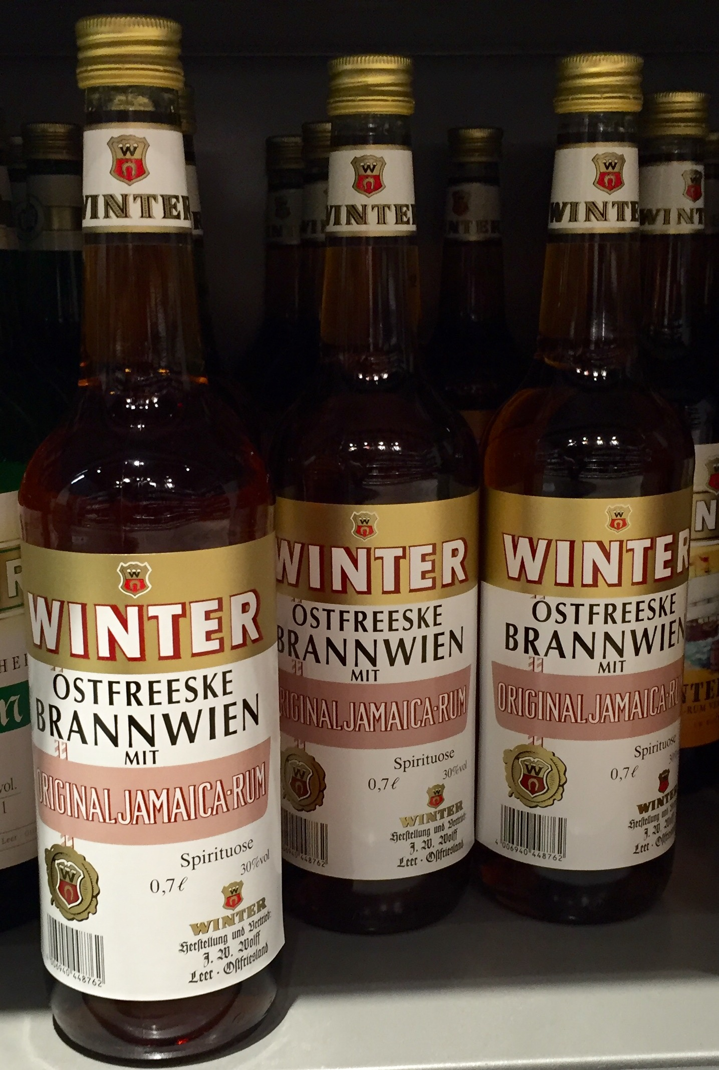 Ostfreeske Brannwien mit Jamaikarum